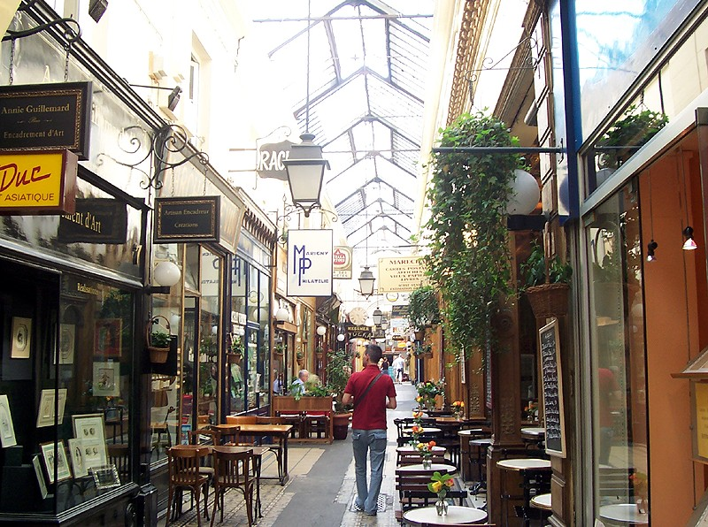 Parigi - Passage des Panoramas